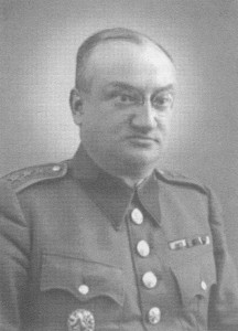 Brig. gen. Josef Tacl, důstojník československé armády